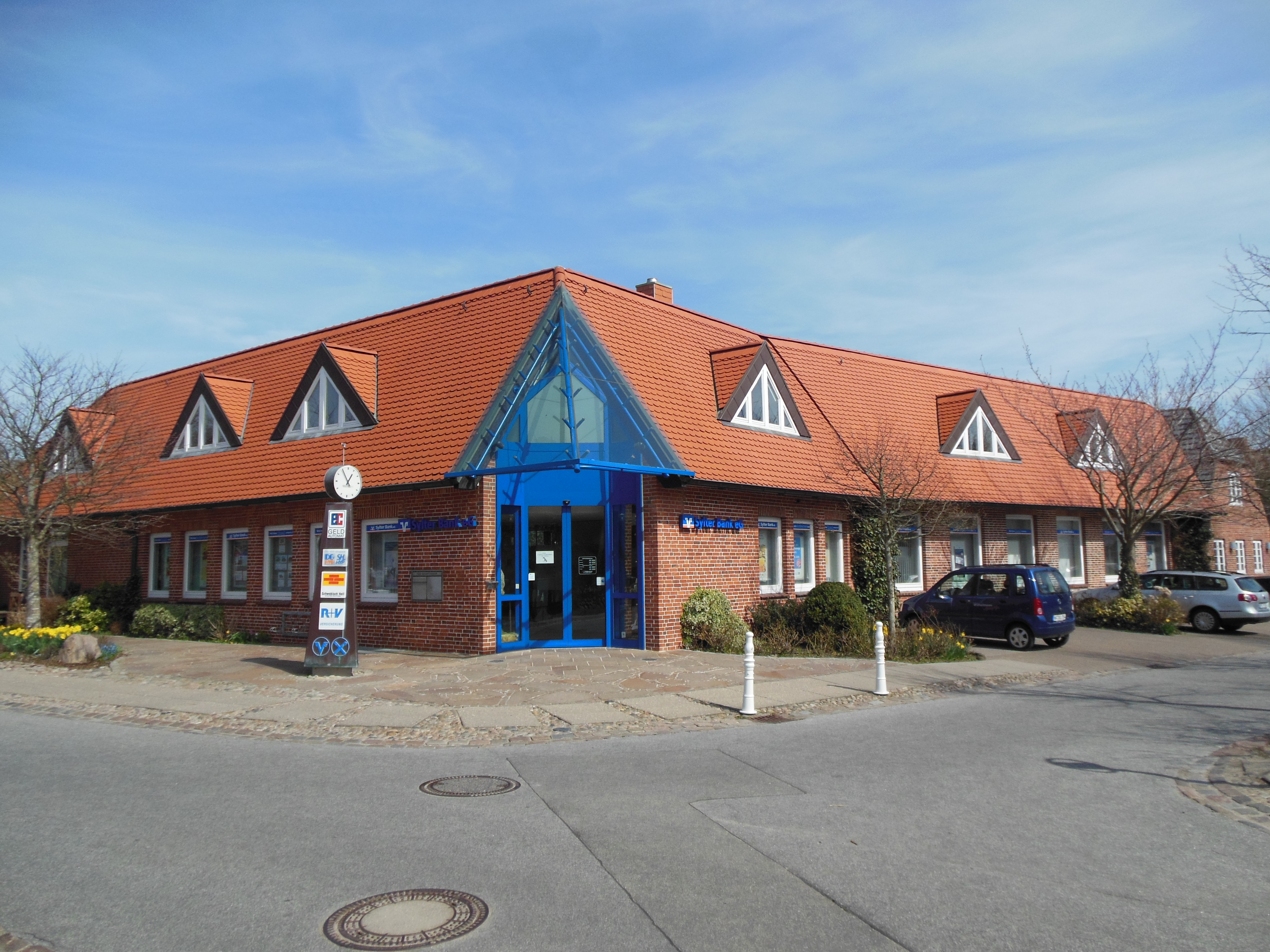 Gebäude der Sylter Bank eG Bahnhofstraße 15, 25980 Sylt/Keitum, Deutschland